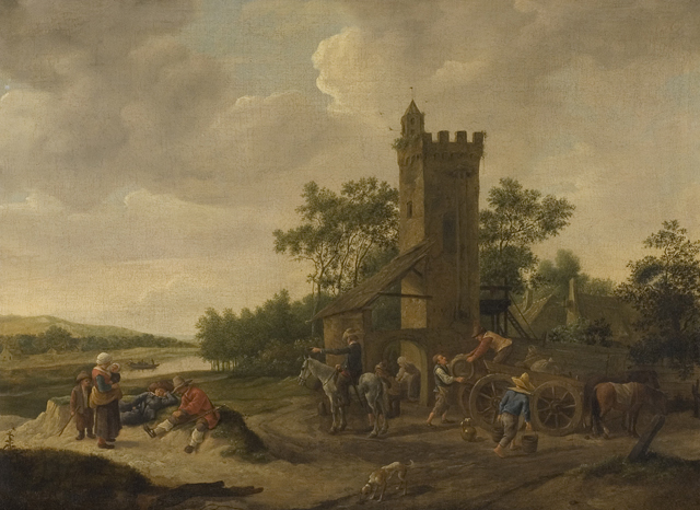 Recommendation number: 1.89B Type: NK collection Publishing date: 16 December 2012 Period loss of possession: 1940-1945 Location of loss: The Netherlands